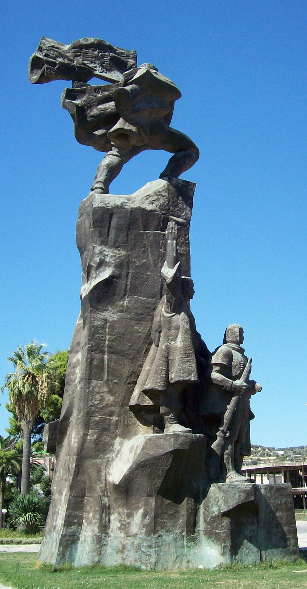 Vlora Unabhängigkeitsdenkmal im Stil des sozialistischen Realismus (Seitenansicht)